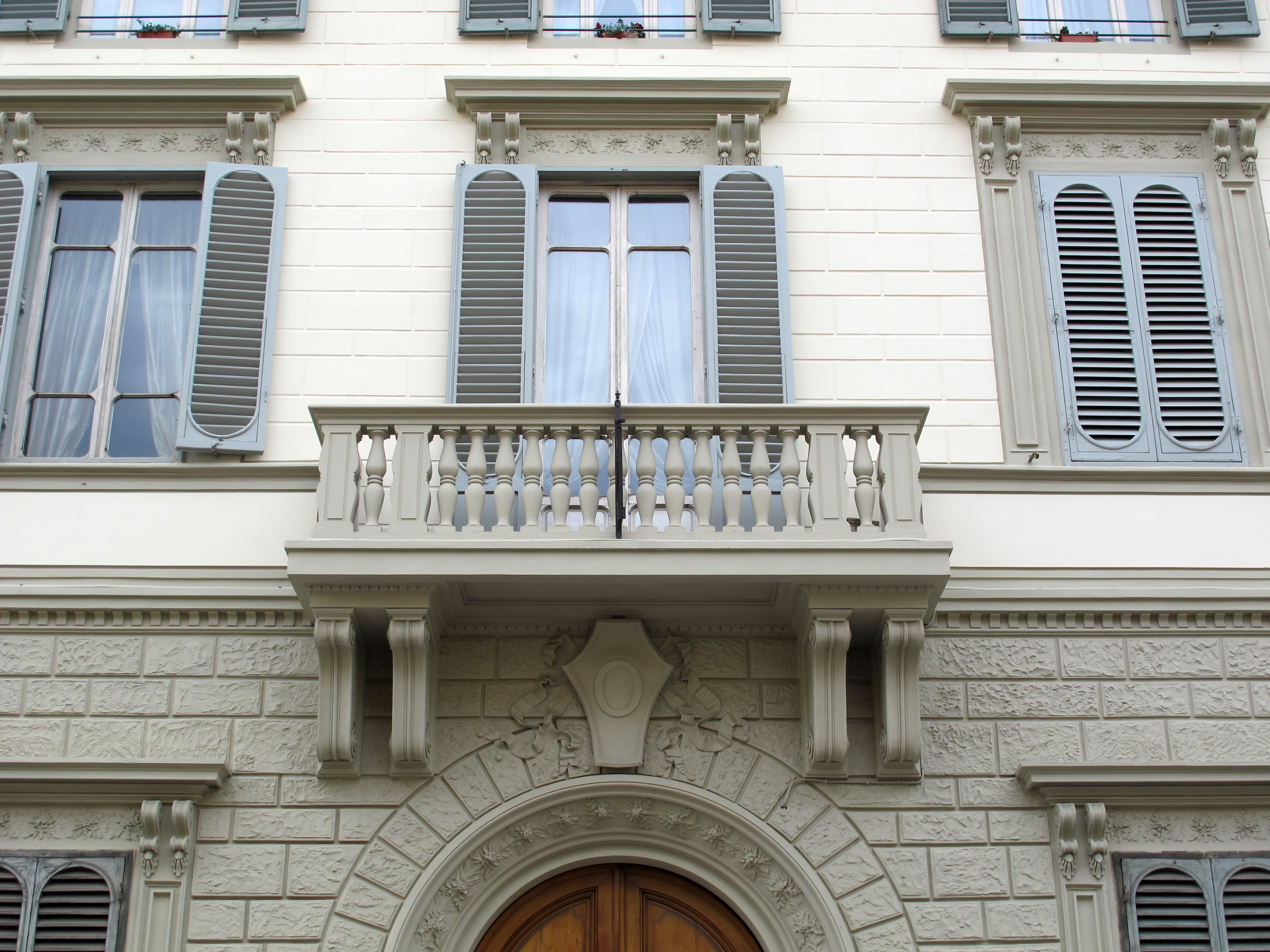 Via della mattonaia 21, Palazzina Ottolenghi di Vallepiana